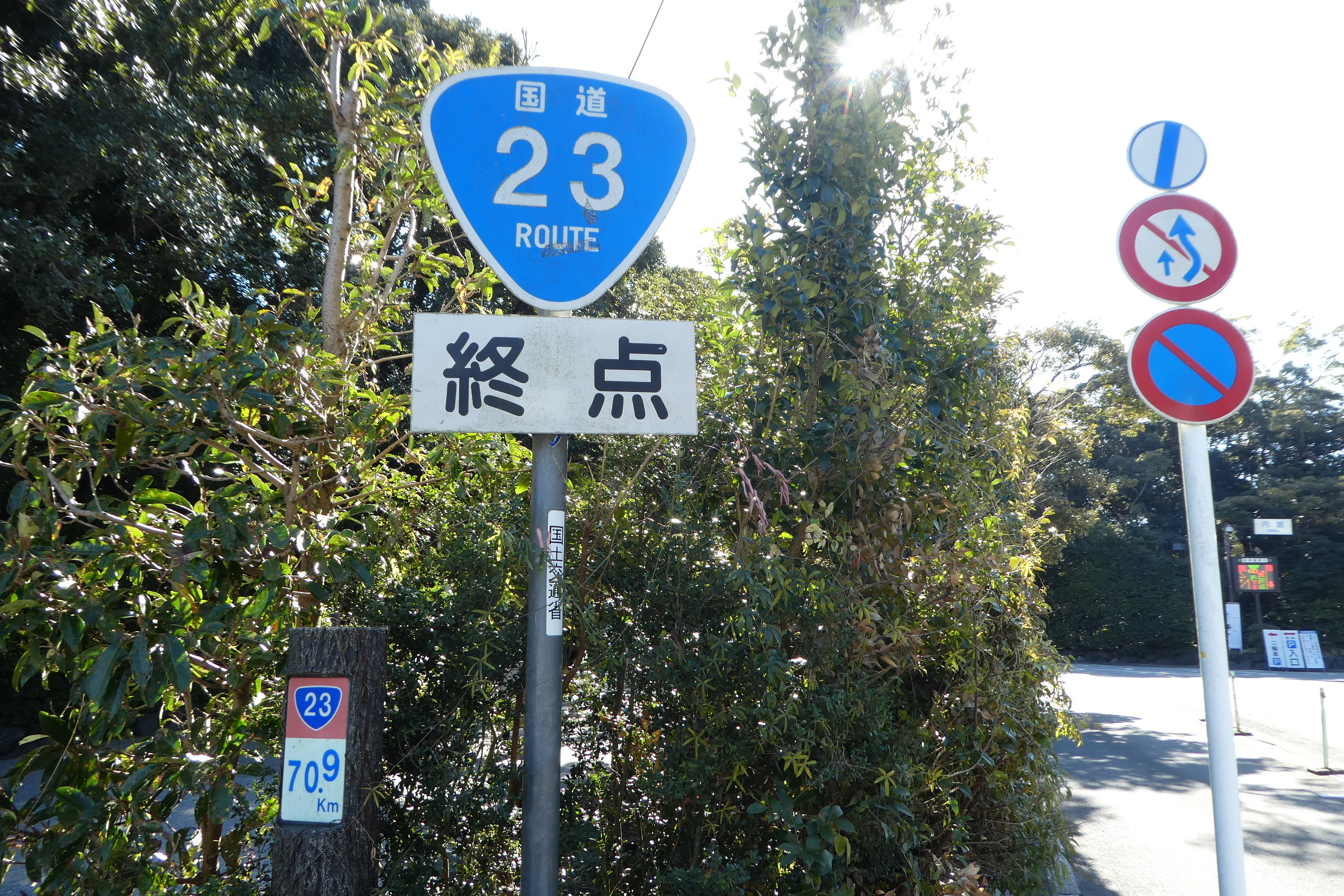 三重県伊勢市の伊勢神宮内宮（皇大神宮）前にある、国道23号の終点。